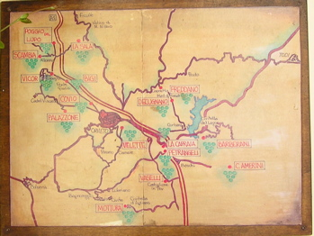 Weinbaugebiet des Orvieto auf einer örtlichen Karte